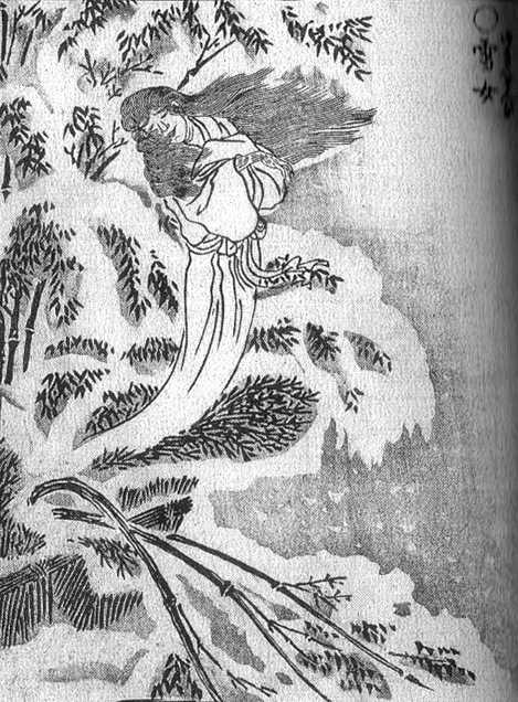 Yuki-onna(雪女) from the Gazu Hyakki Yakō